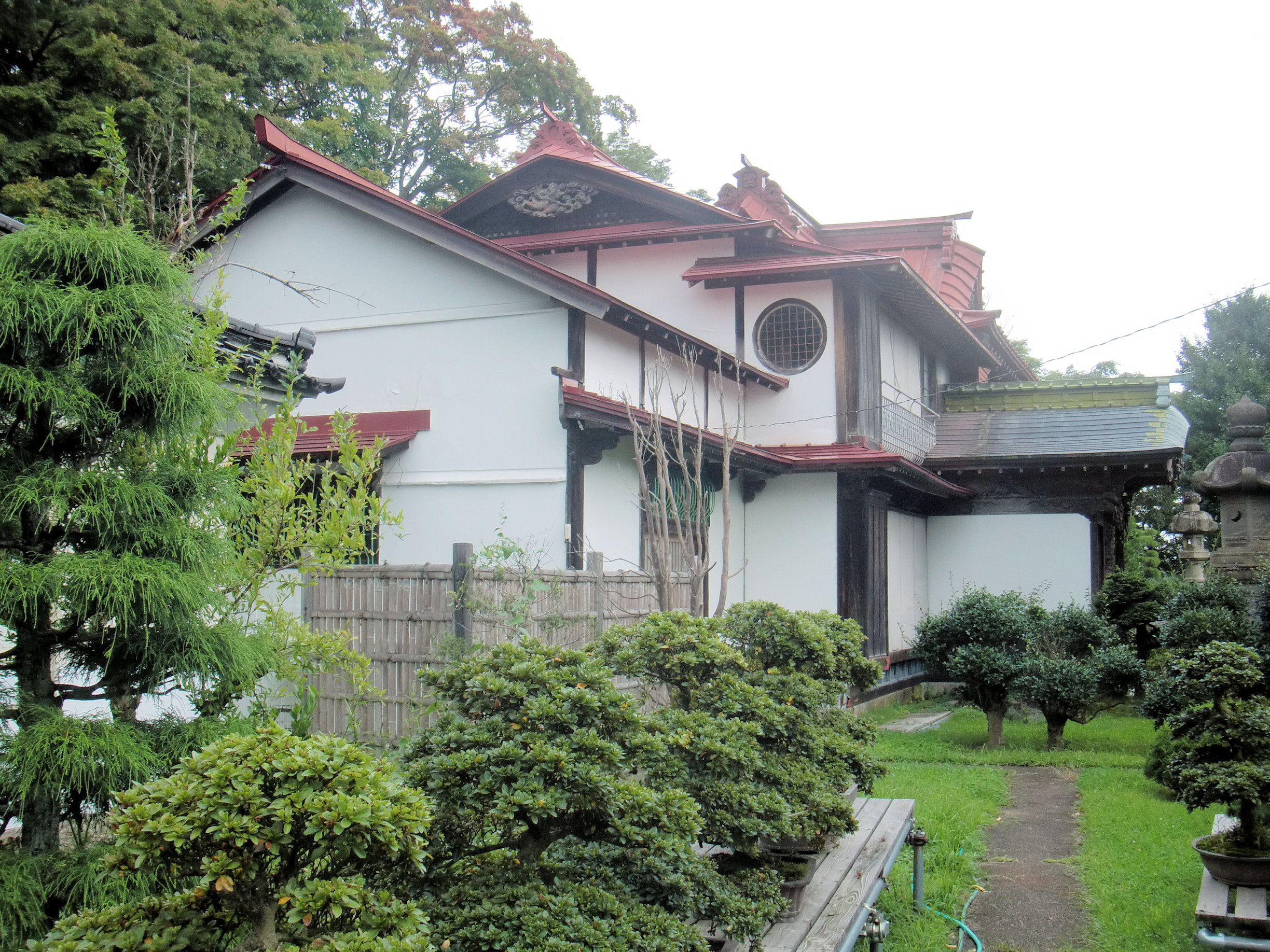 本宮市の蛇の鼻御殿 入口付近から